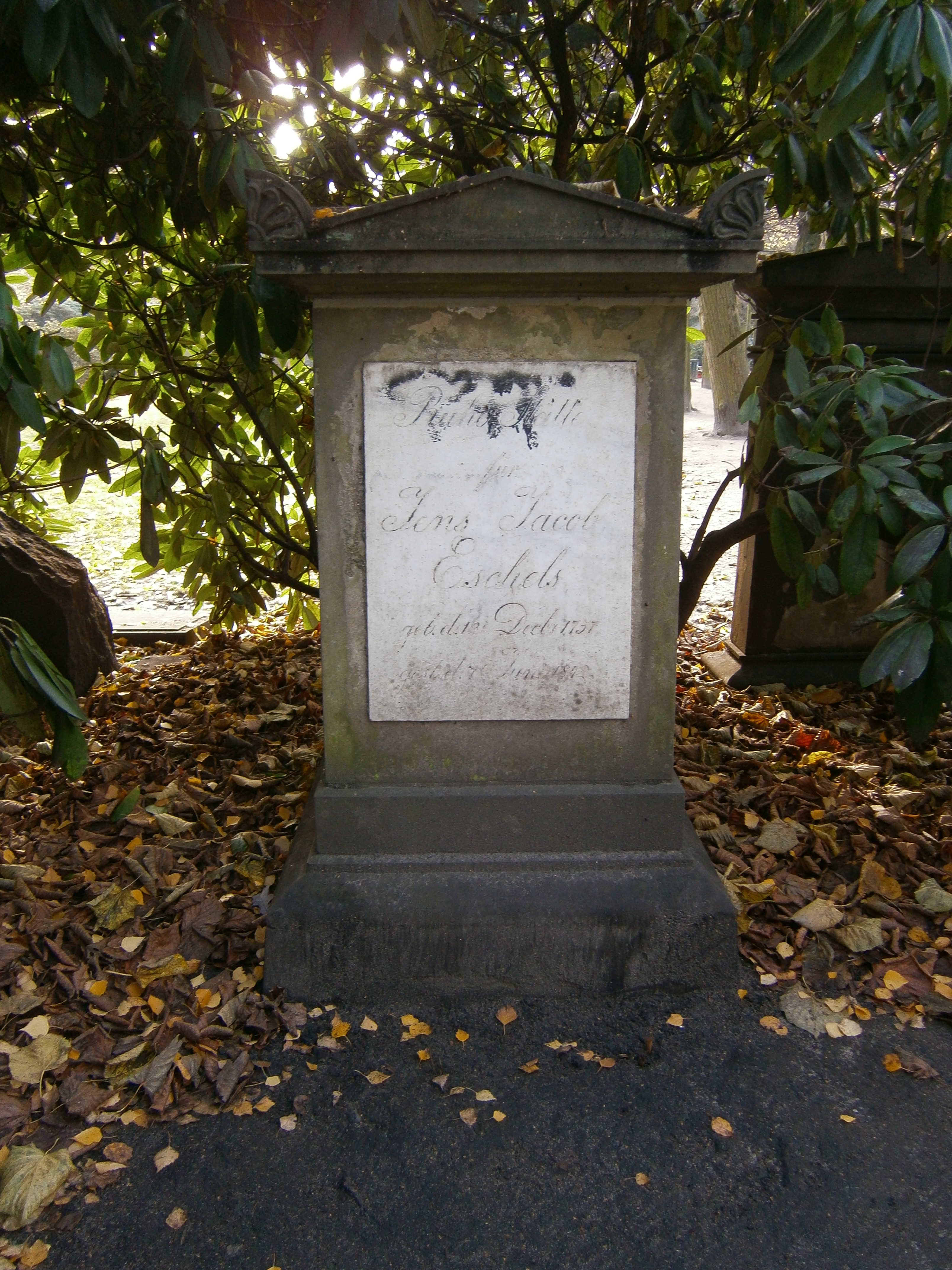 Friedhof Norderreihe: Jens Jacob Eschels, geb. 1757, gest. 1842. Sandsteinblock. gegiebelter Aufsatz mit Eckakroterien und Urne (fehlt).This is a photograph of an architectural monument.